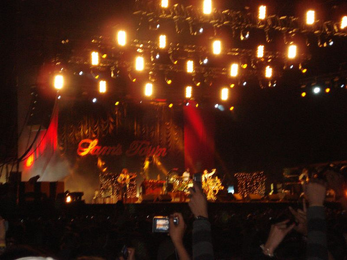 The Killers, MotoRoKr Fest Foro Sol, Ciudad de México, 19 de Octubre de 2006.